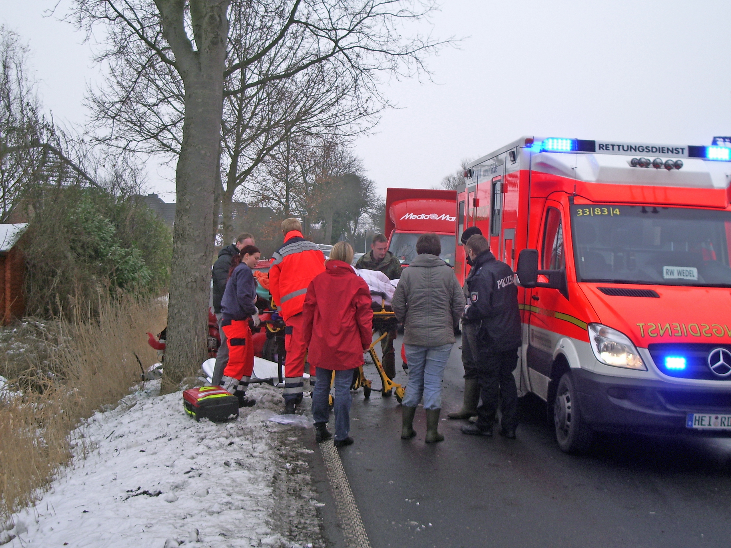 Verkehrsunfall mit einer schwerverletzten Person auf der Landstraße L261 im Kreis Pinneberg, Deutschland